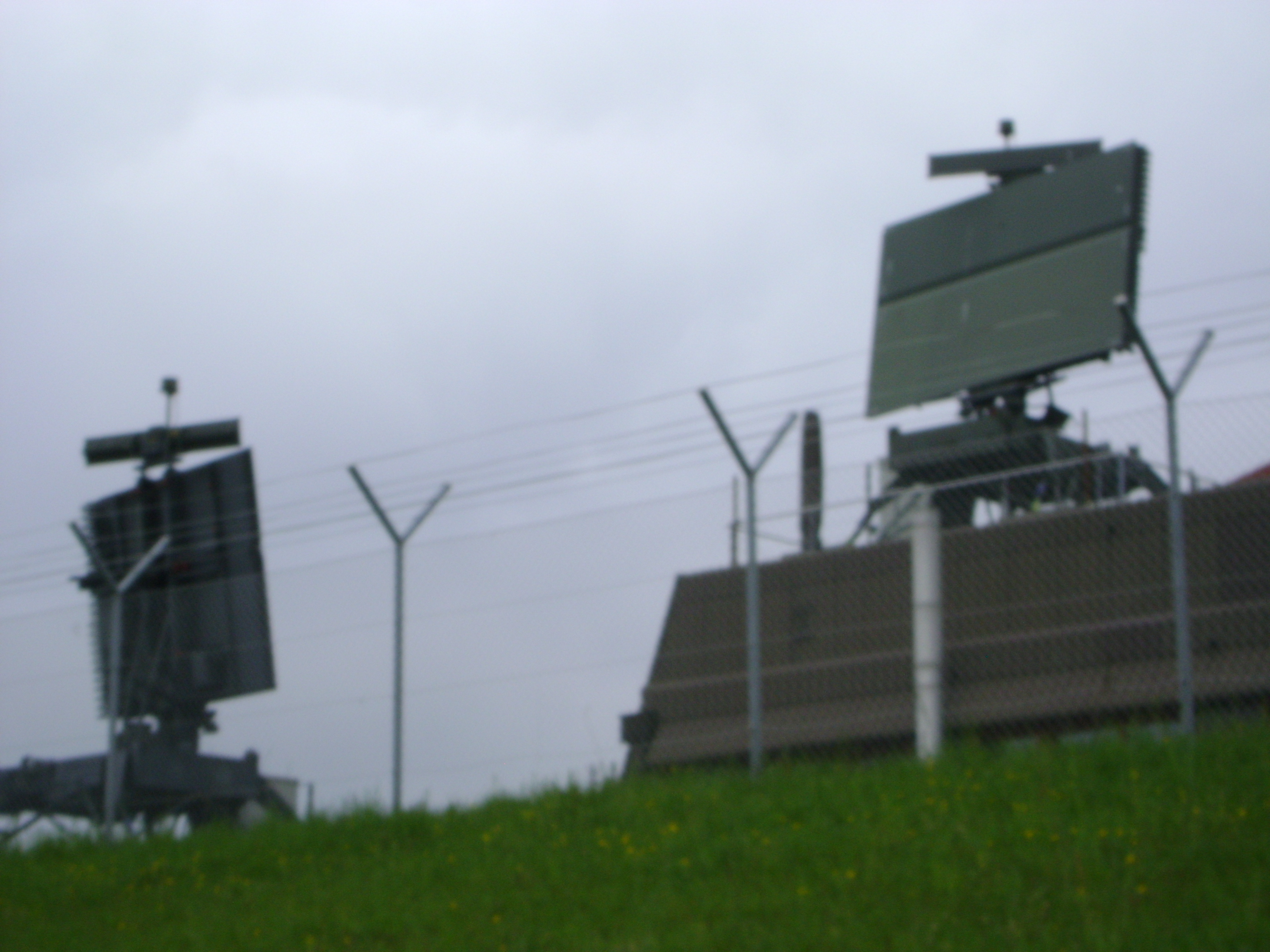 TAFLIR Wangener Berg zusammen mit mobilem TAFLIR